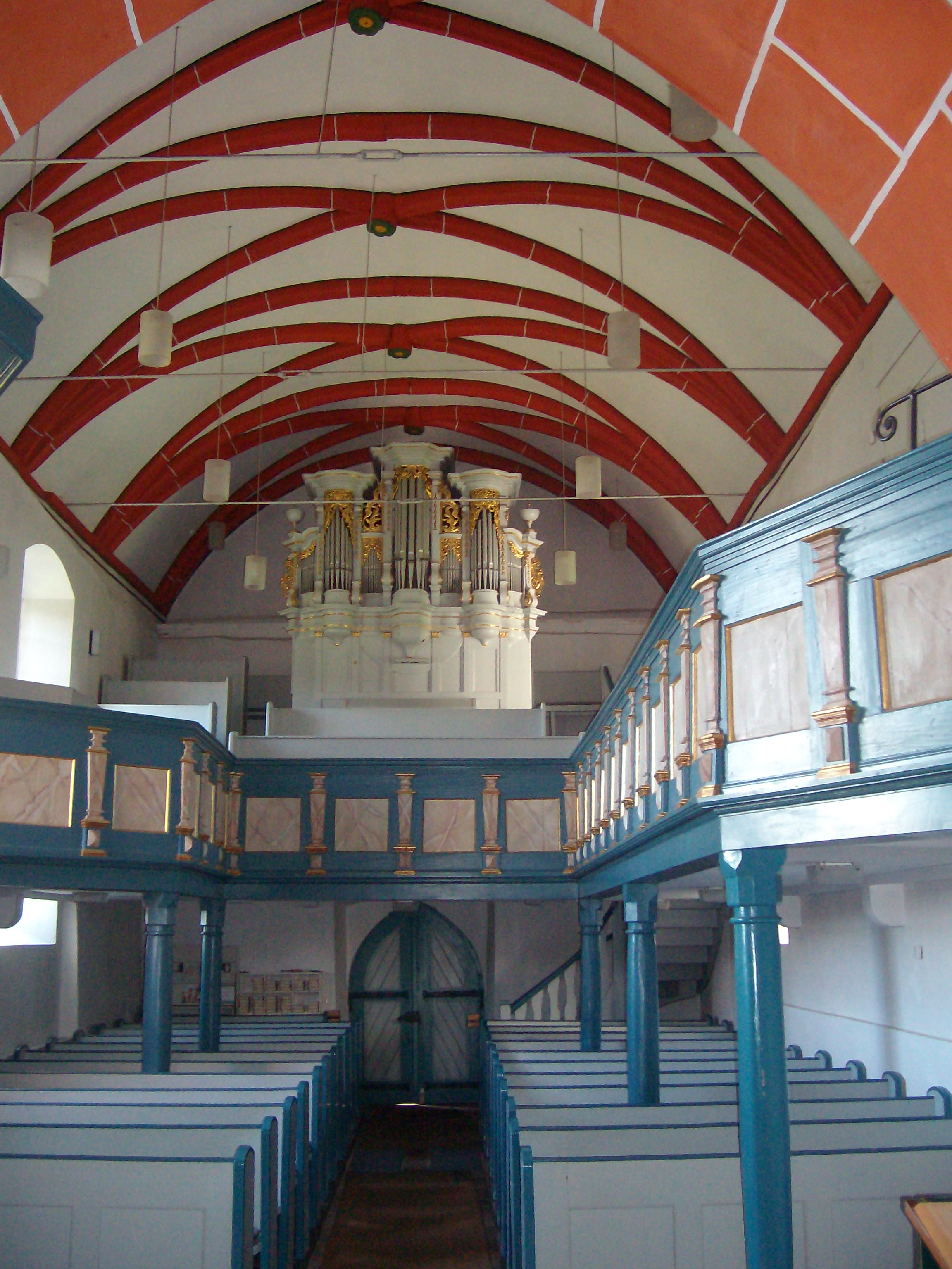 Innenraum der Evangelischen Kirche Gonterskirchen, Laubach, Landkreis Gießen, Hessen, Deutschland